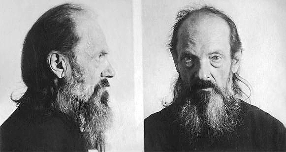 епископ Сергий (Васильков). Следственное фото